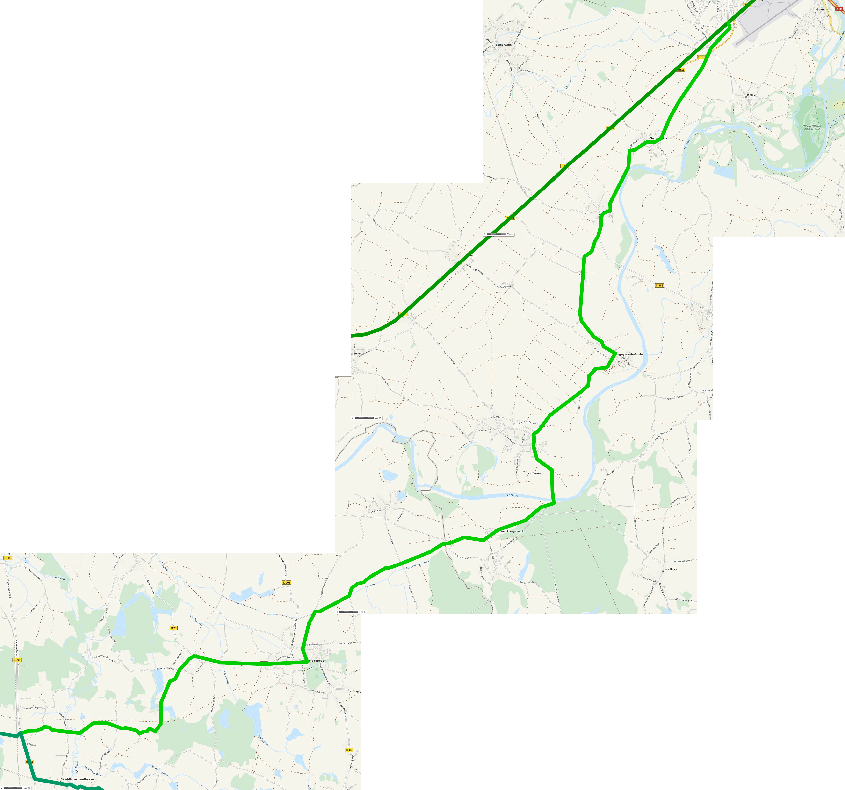 Karte der Römerstrasse von Chalon-sur-Saône nach Dole - Teilstück Saint-Bonnet-en-Bresse bis Tavaux über Pierre-de-Bresse Carte de la voie romaine de Chalon-sur-Saône à Dole - Partie entre Saint-Bonnet-en-Bresse à Tavaux par Pierre-de-Bresse This map may be incomplete, and may contain errors. Don't rely solely on it for navigation.